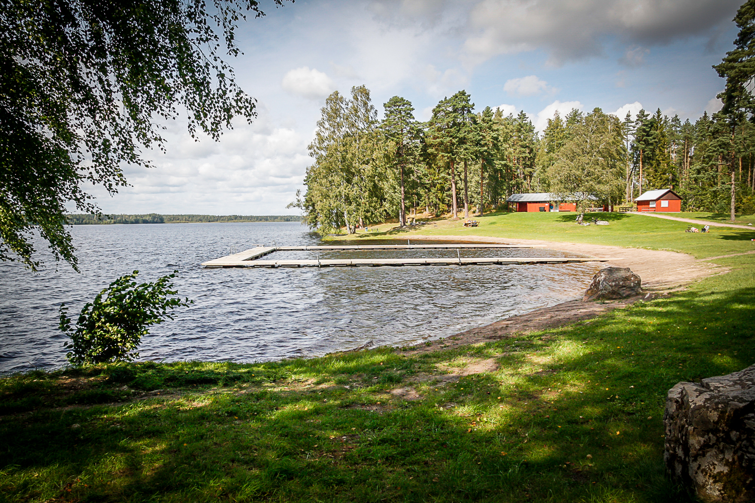 Badplatsen vid Gimo damm, en sensommardag i augusti